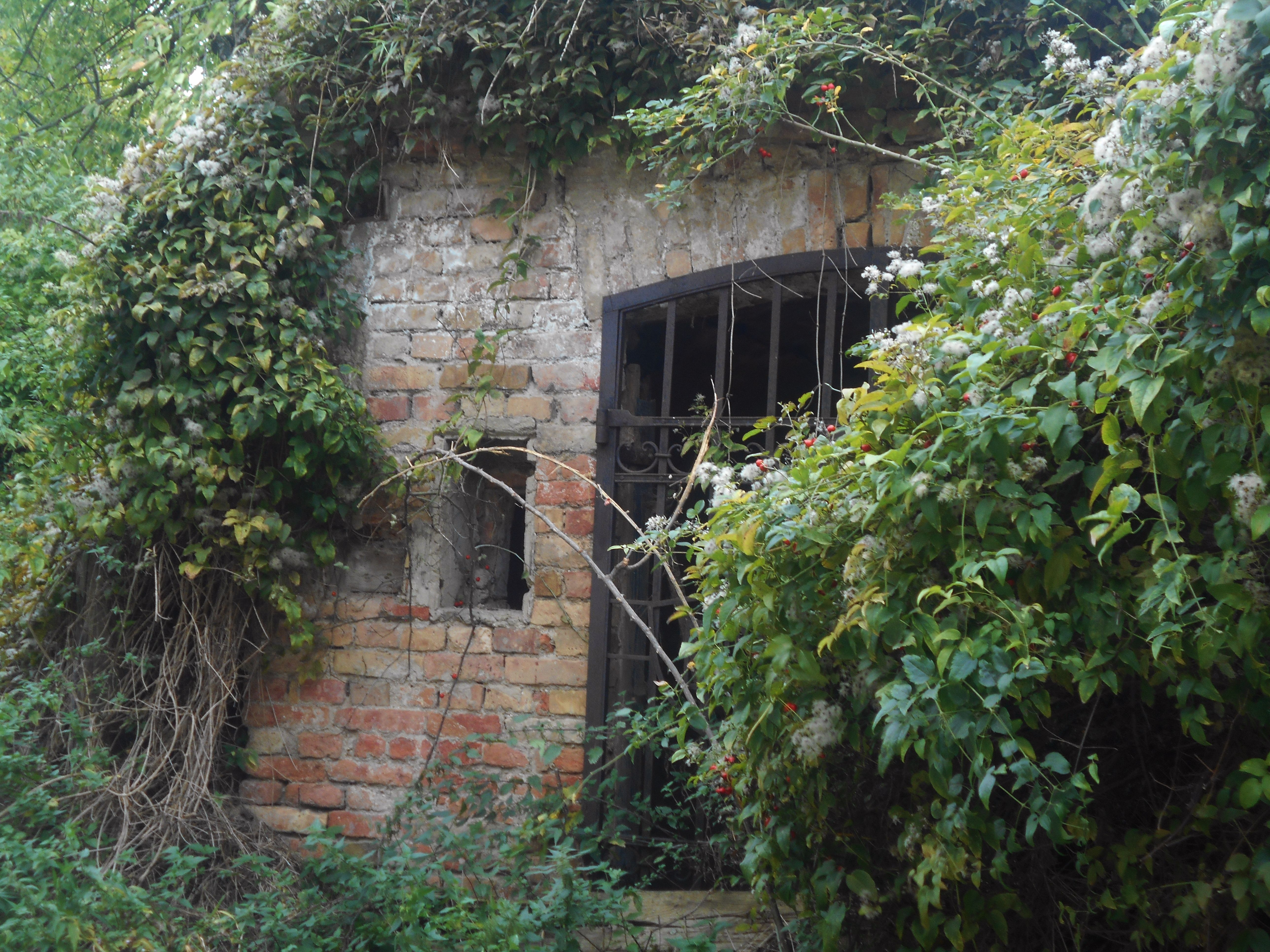 Alter Weinkeller in der Kellergasse Neusatzgasse, Stammersdorf